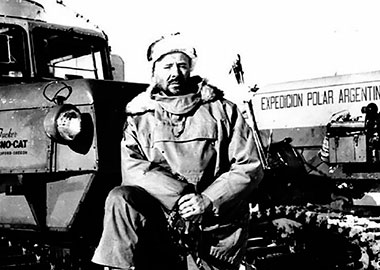 El general Jorge Leal sobre un snowcat en la expedición polar argentina, 1965